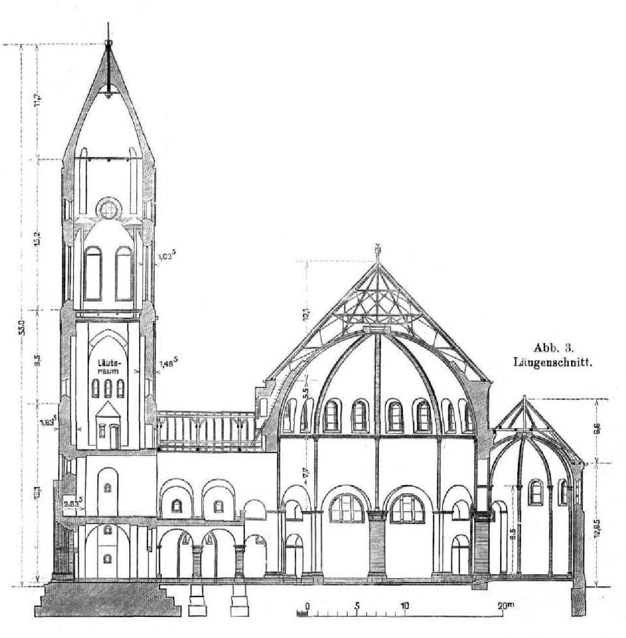 Maria, Hilfe der Christen in Berlin-Spandau Abbildung aus dem Zentralblatt der Bauverwaltung - Längsschnitt